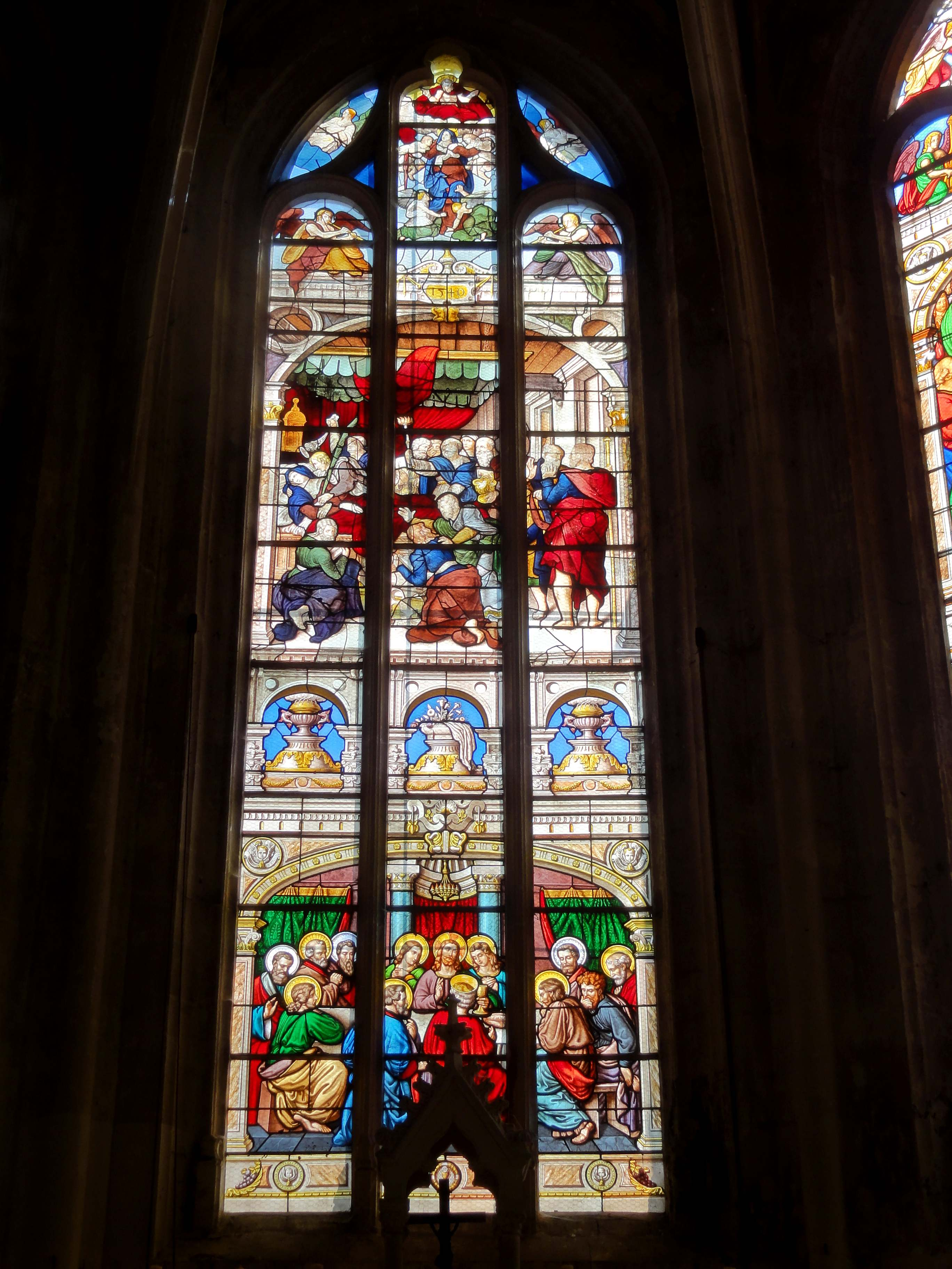 Vitraux de la baie d'axe du chevet (n°). Régistre inférieur : la Cène, 1873 (inscrit M.H.); régistre médian : Dormition de la Vierge, 1540 et registre supérieur (tympan) : Assomption de la Vierge, 1540, tous deux classés M.H..